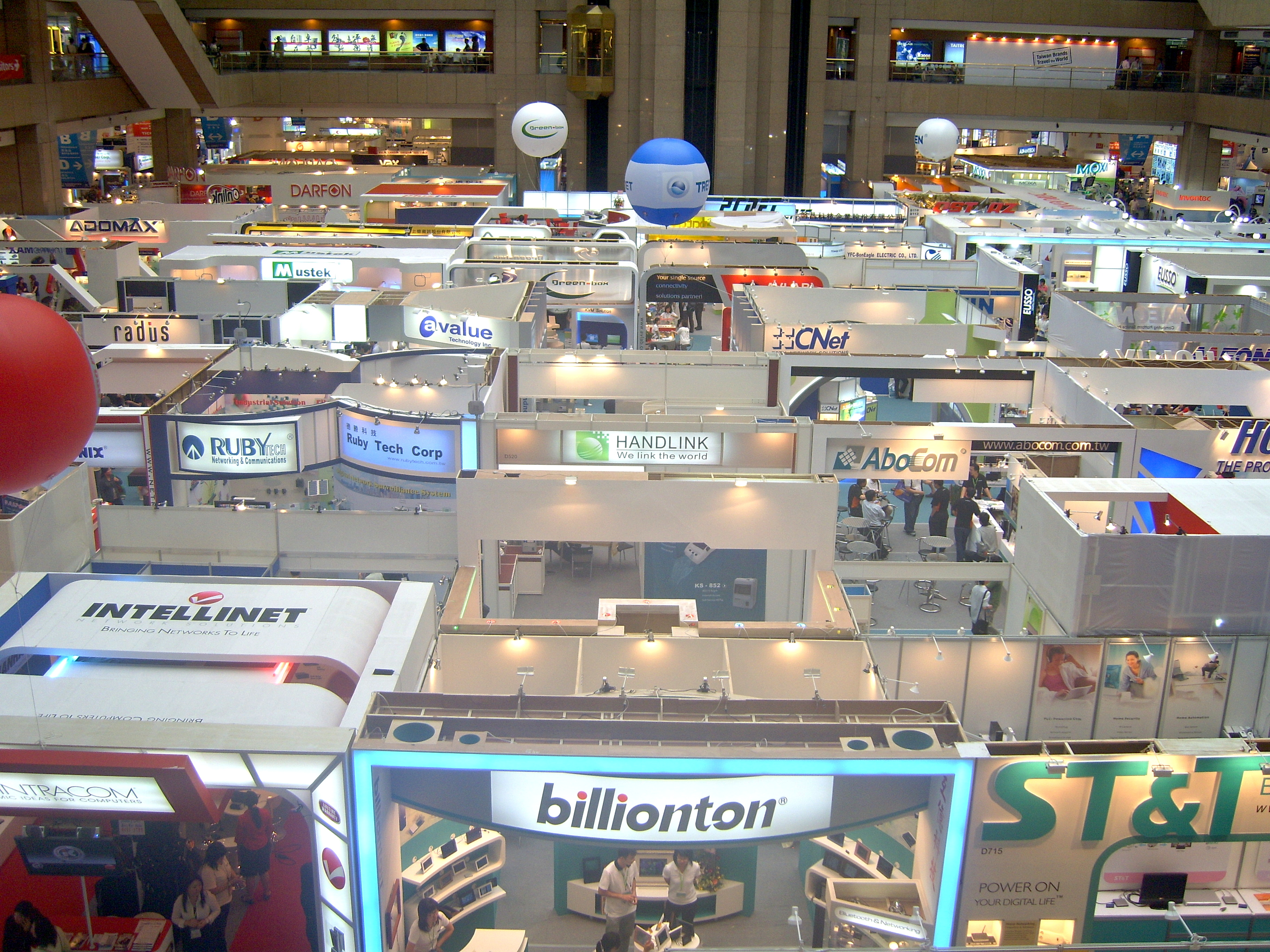 2008 Computex.